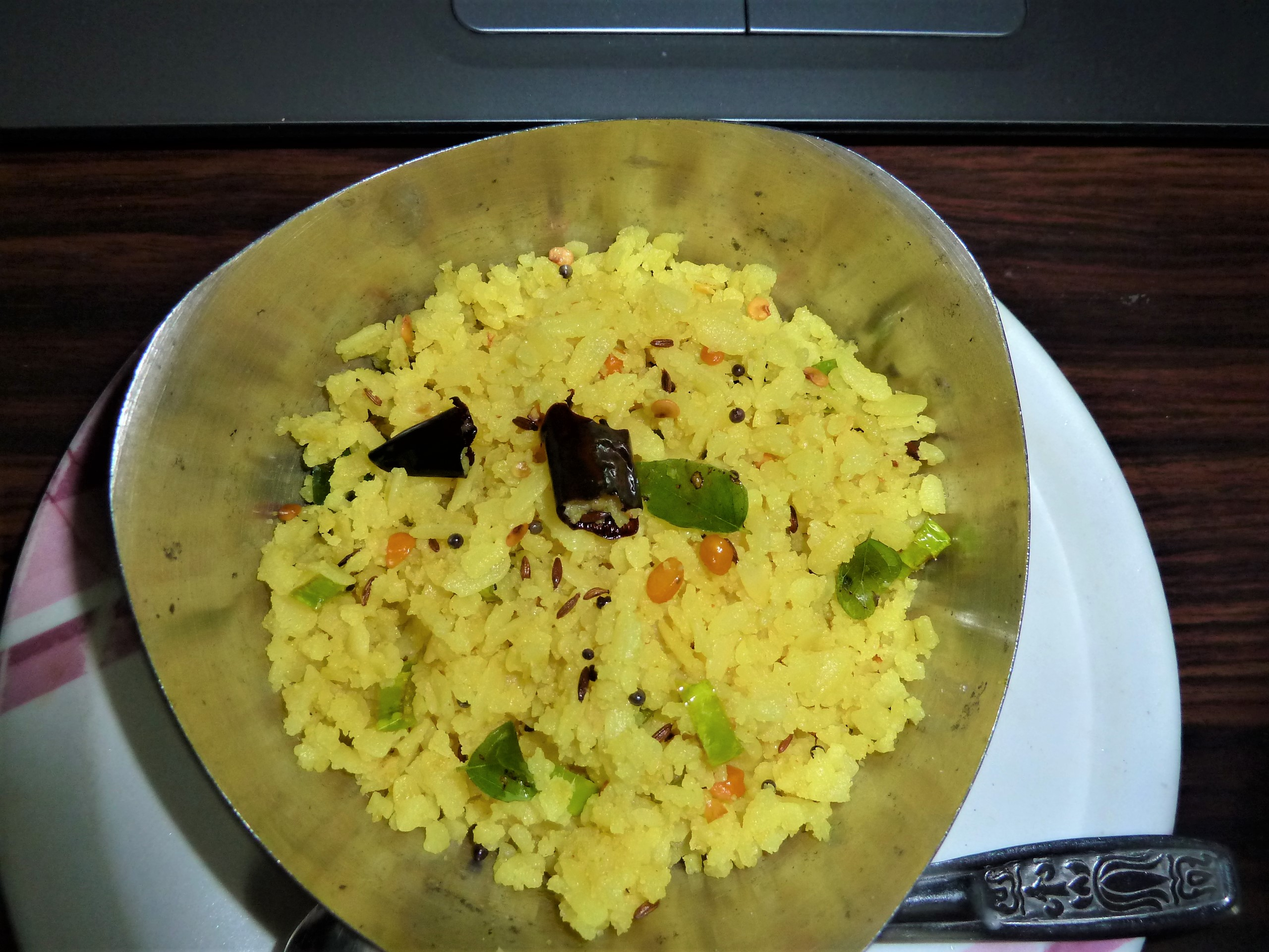 అటుకుల ఉప్మా